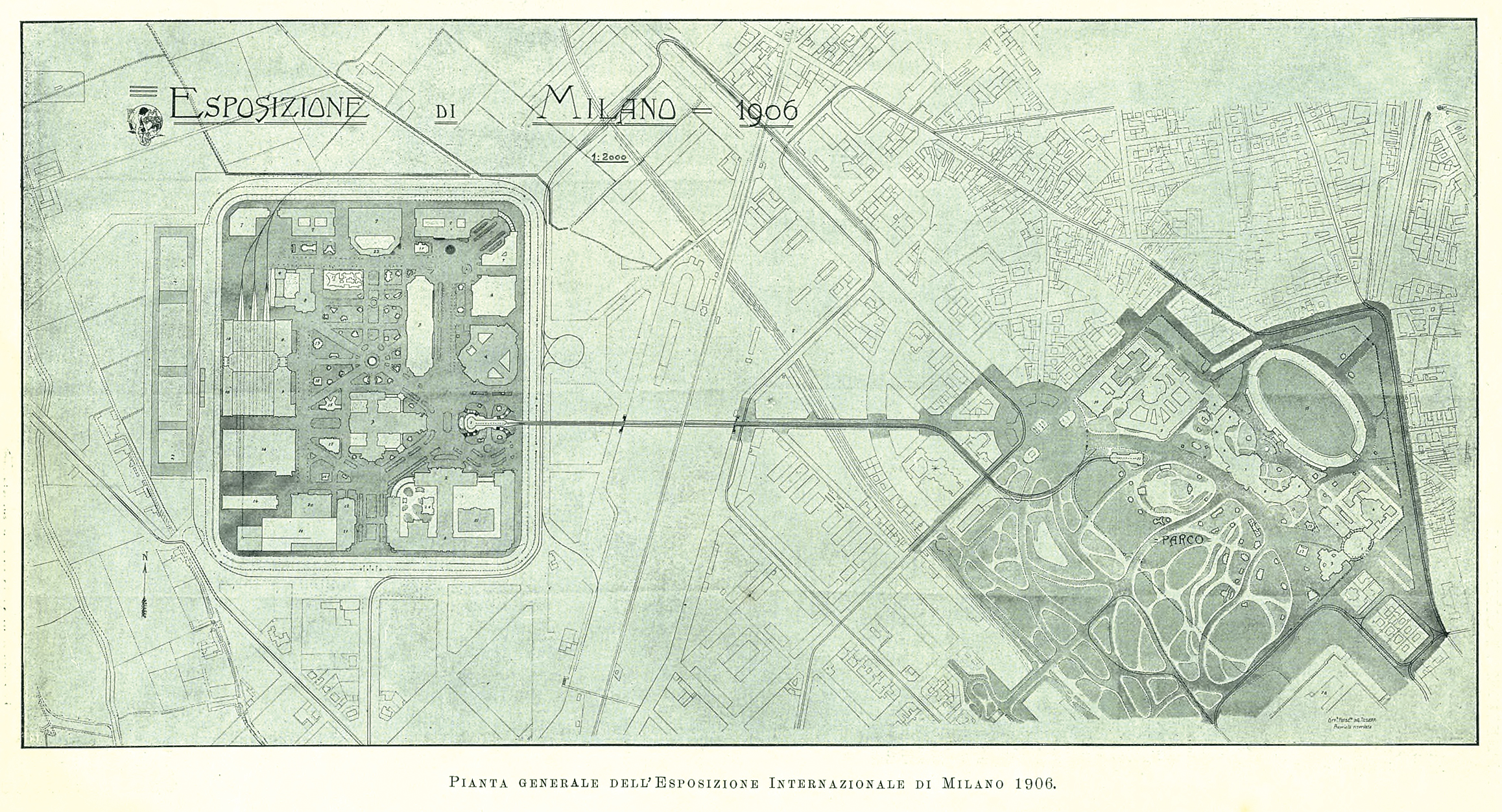 Pianta generale dell'Esposizione Internaionale di Milano del 1906